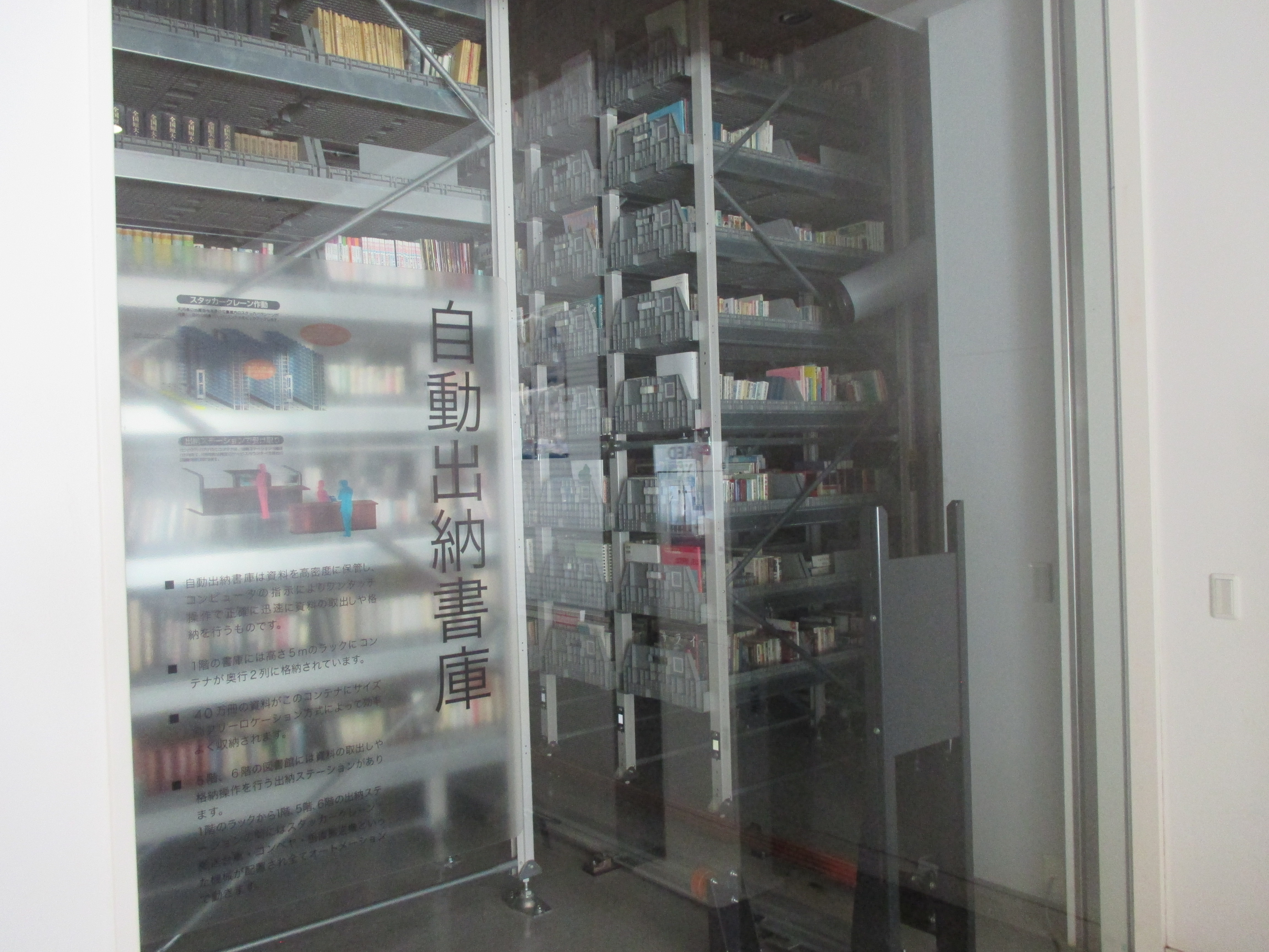 高崎市立中央図書館の自動出納書庫（1階）